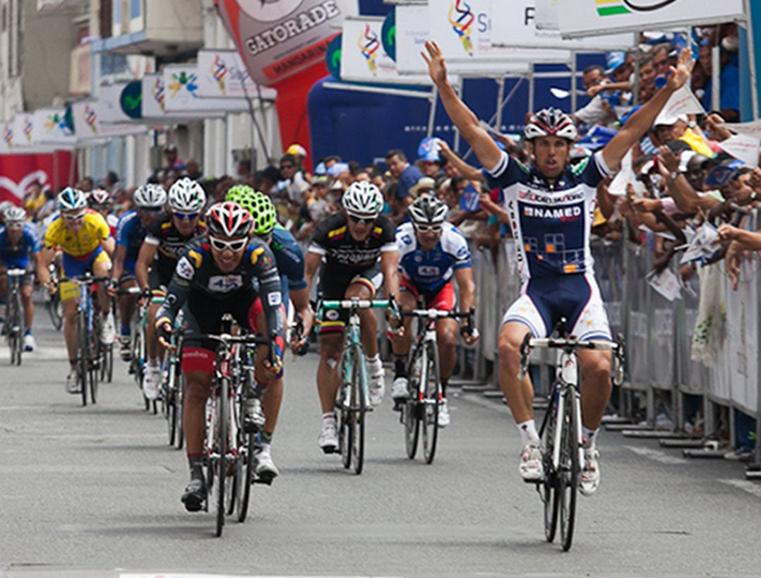 Victoria de Marco Zanotti en la llegada de la 7ª etapa de la Vuelta a Colombia 2012.